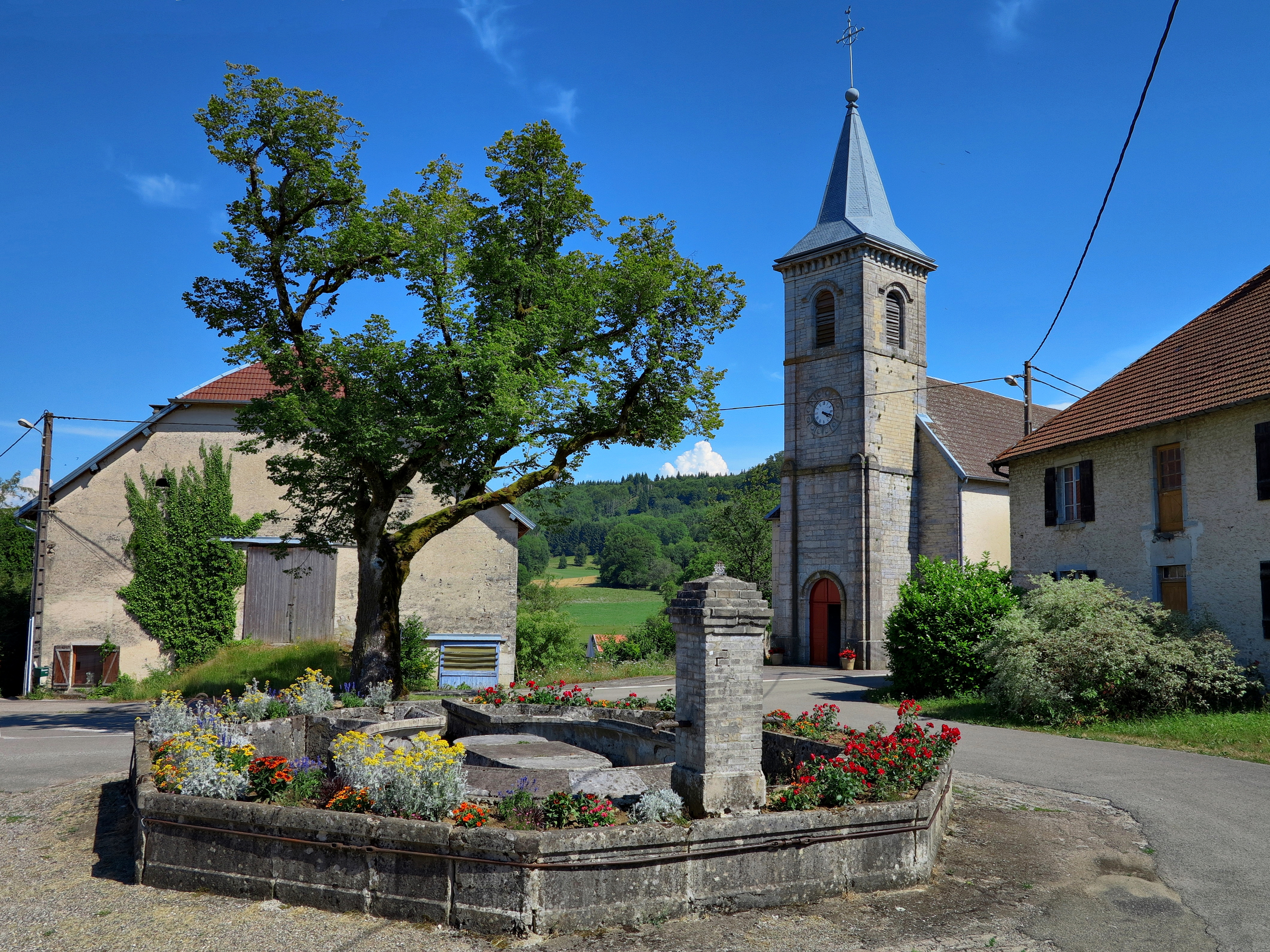 Le lavoir-abreuvoir et l'église